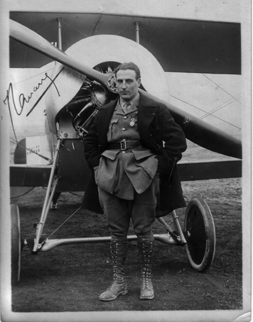 Jean Navarre signée par lui pour Maurice Loiseau ; prise à Issy-les-Moulinaux devant son avion Nieuport XI N° 868.